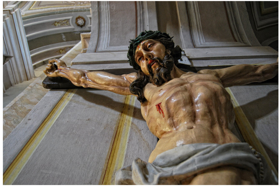 Biserica romano-catolică "Sf. Maria", Lipova, jud Arad 01